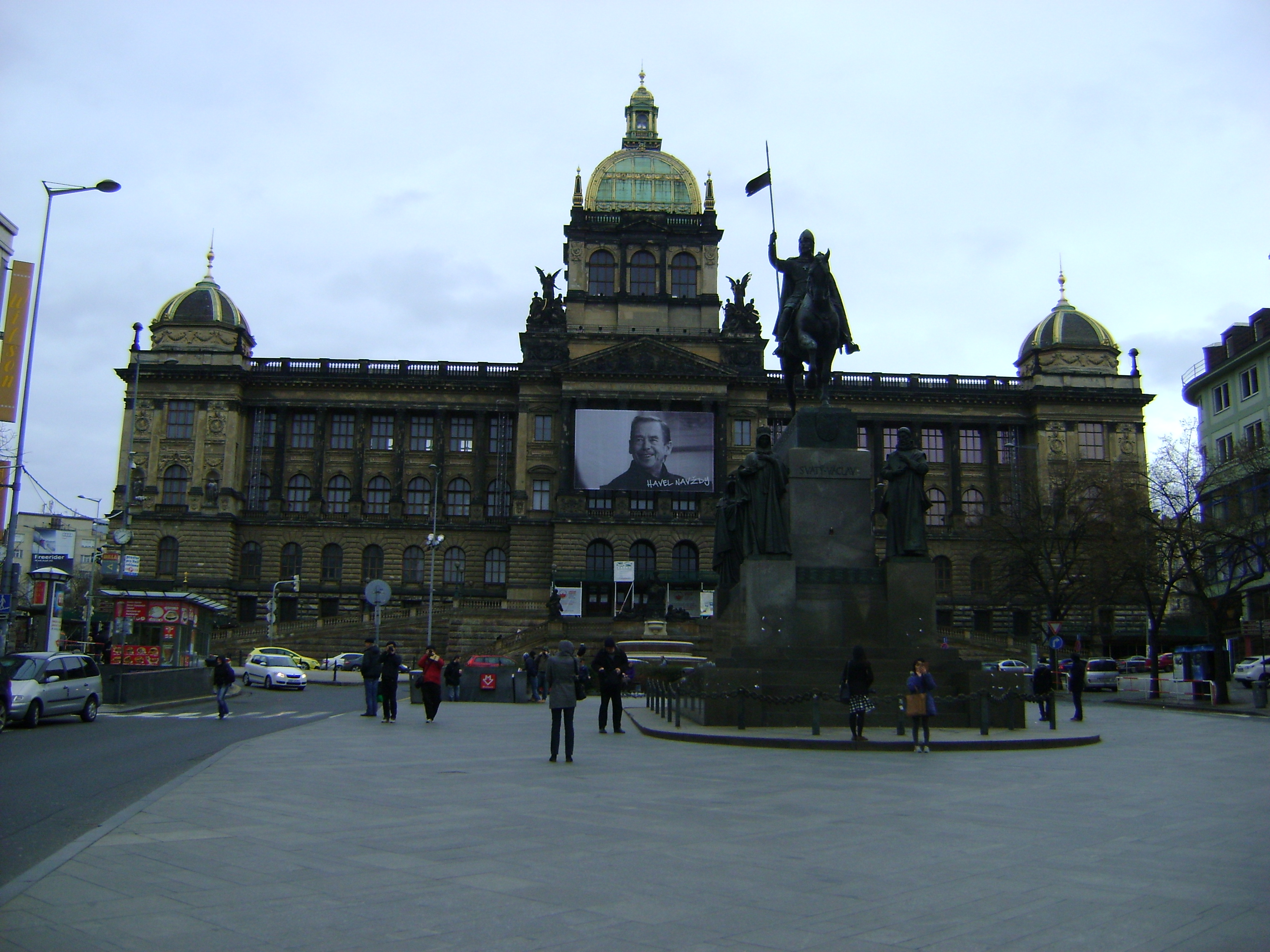 Вацлавська площа (Прага).